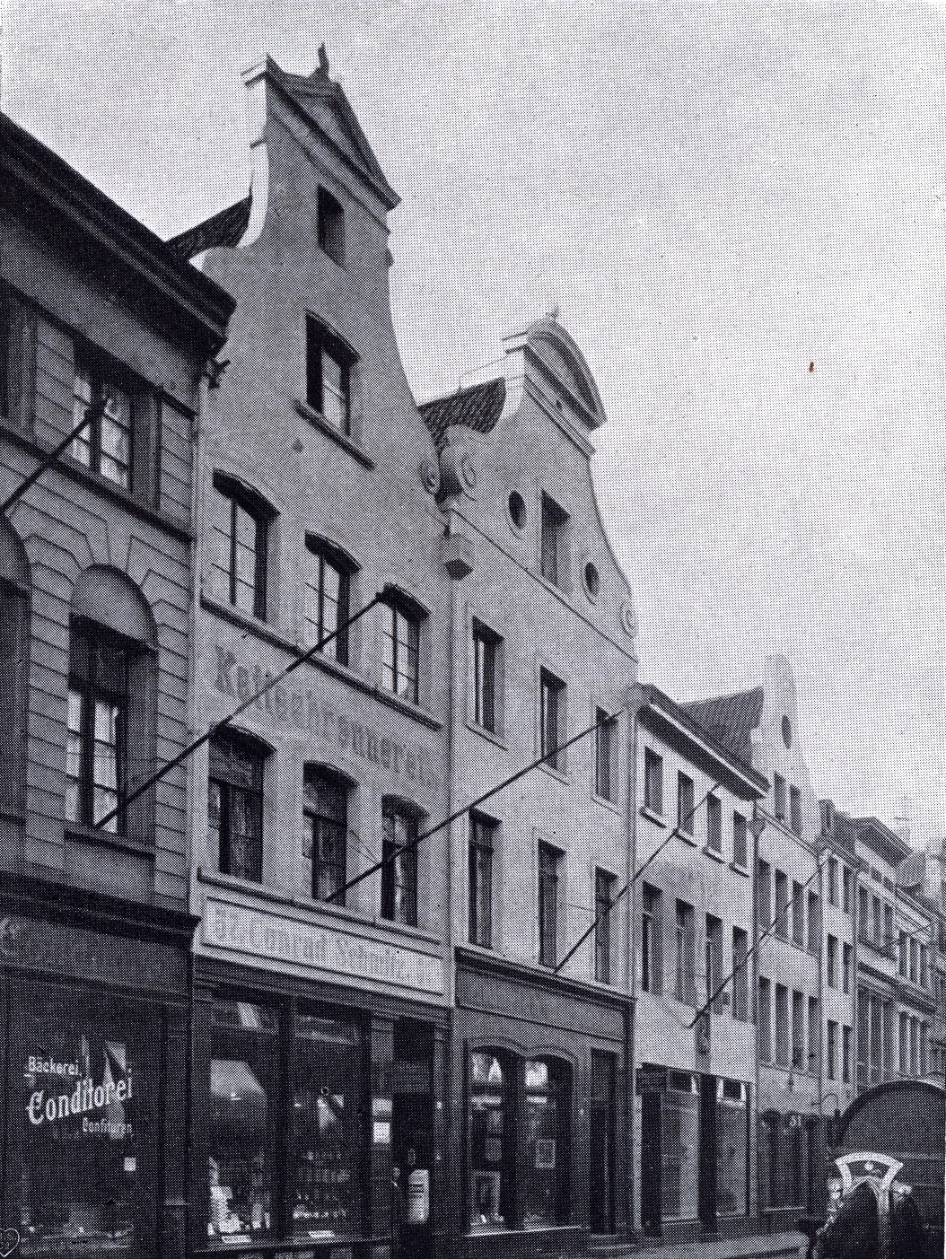 Düsseldorf, Bolkerstraße um 1909: Häuser Nr. 59* (links angeschnitten), Giebelhaus Nr. 57*, Giebelhaus Nr. 55*, Nr. 53 Heine Haus, Giebelhaus Nr. 51, Nr. 49, Nr. 47*, Nr. 45*. *nicht mehr existent